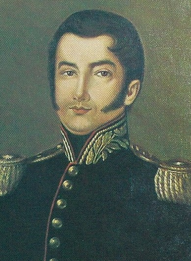 Retrato del General José María Paz (1791-1854), Argentina.